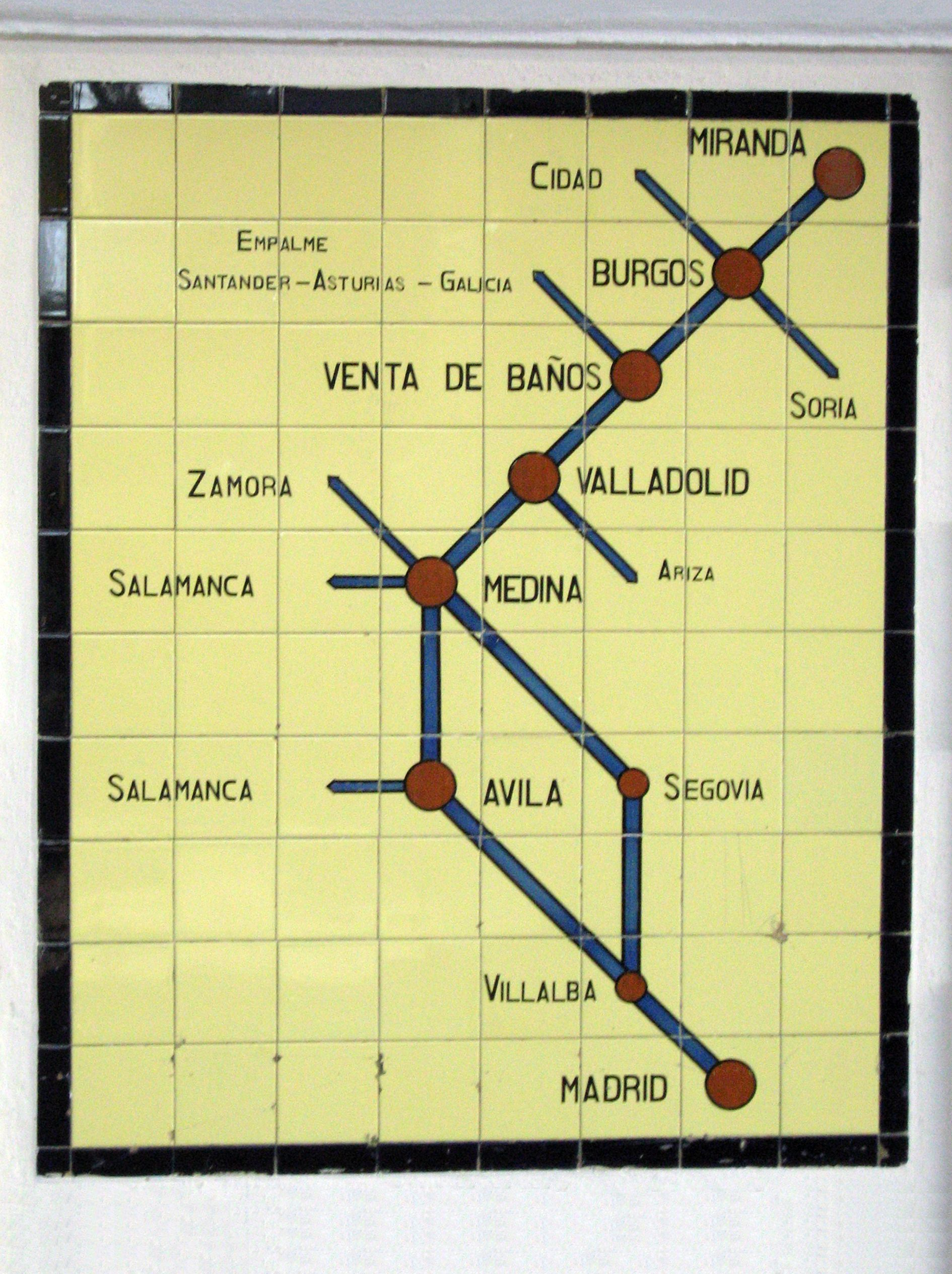 MIRANDA DE EBRO mural. fimgg1 0992 ( v46 )